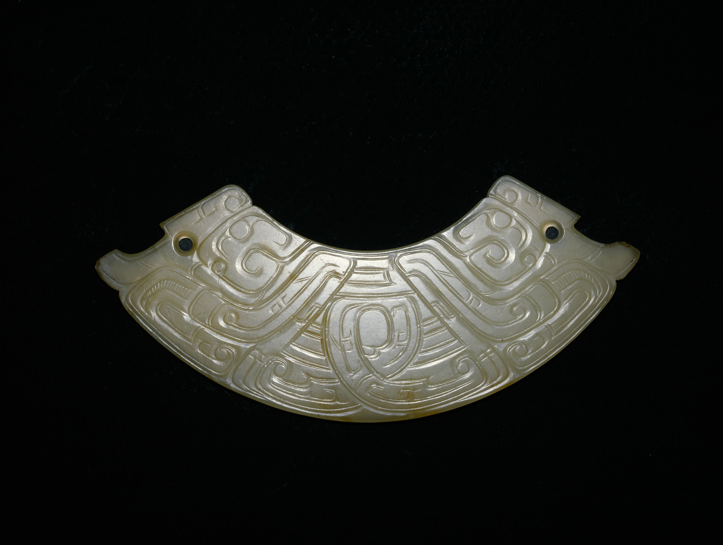 Arc-shaped pendant (huang)